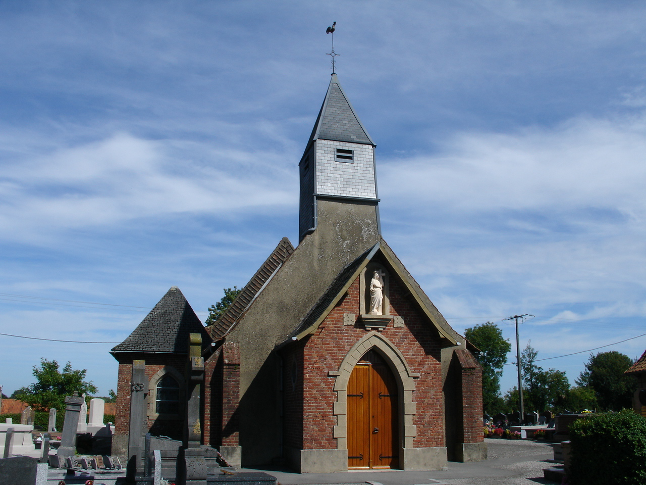 Église de Senlecques